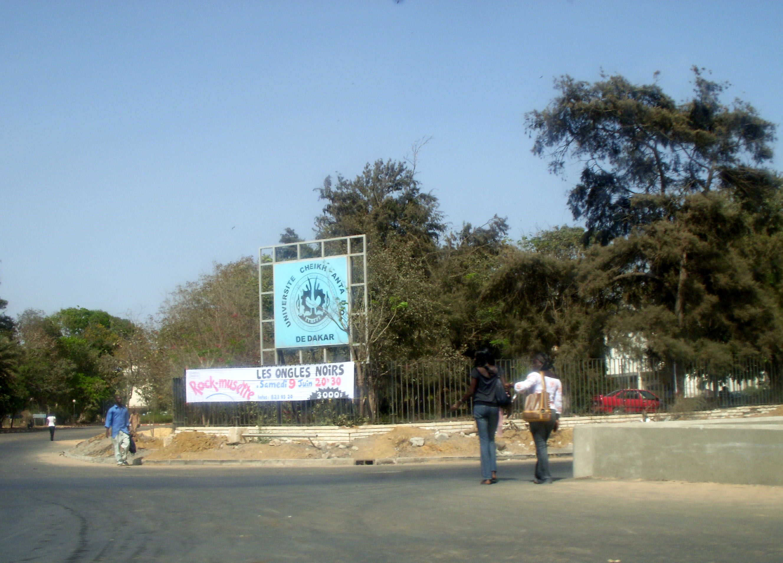 Entrée de l'UCAD (Université Cheikh Anta Diop), Dakar, Sénégal